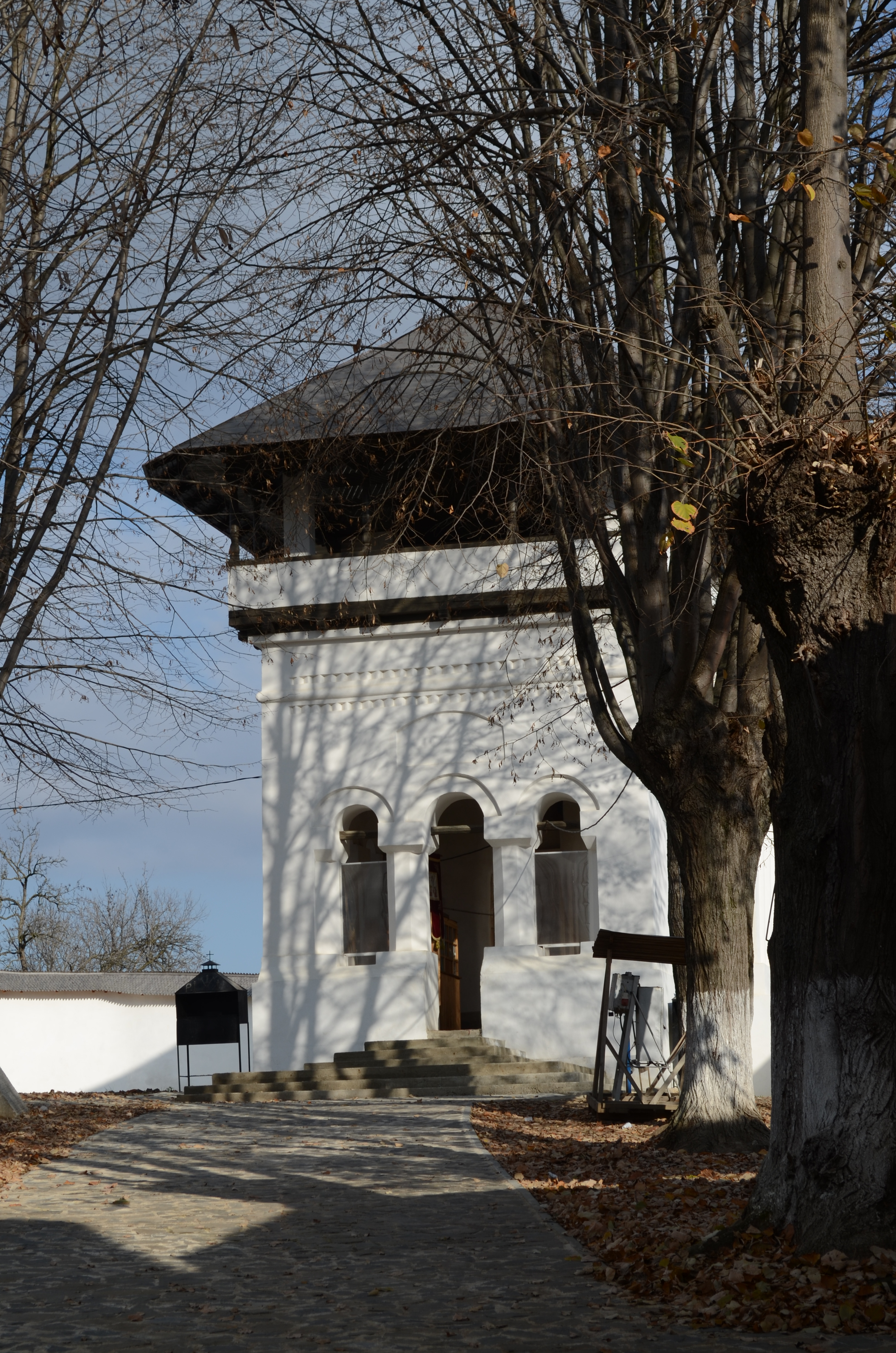 Biserica "Adormirea Maicii Domnului", Mănăstirea Vărbila, Prahova 01